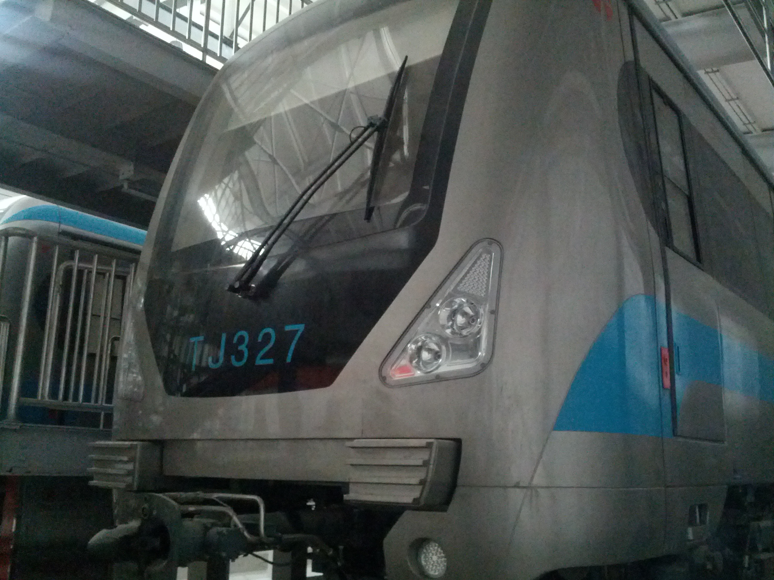 天津地铁三号线列车